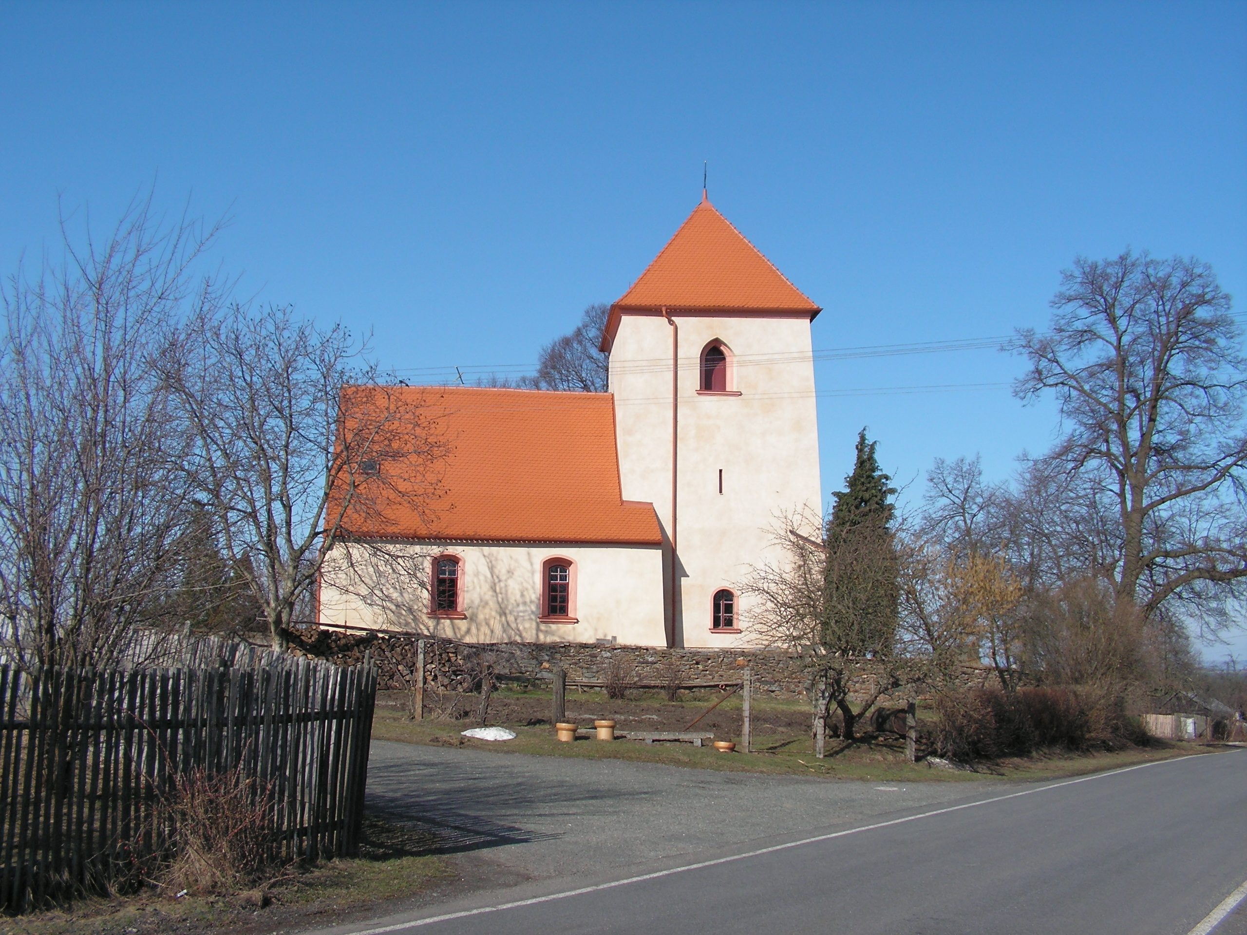 Kostel svatého Václava v Dobrovítově v okrese Kutná Hora